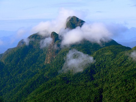 esta foto da serra da mocidade e muito bela